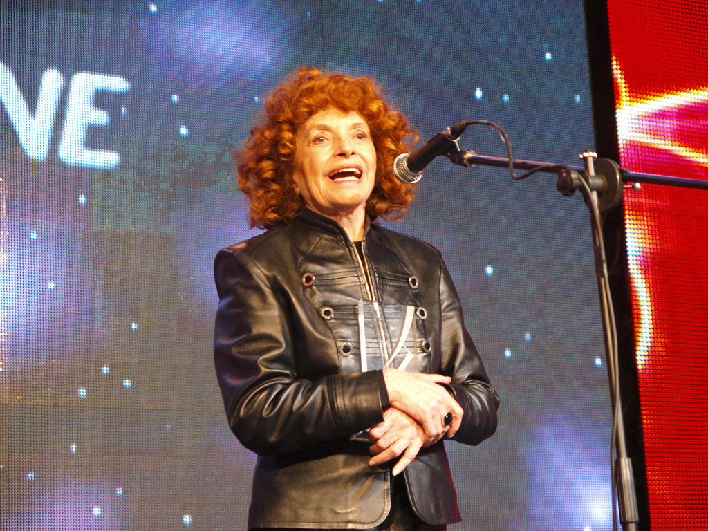 La actriz argentina Cipe Lincovsky